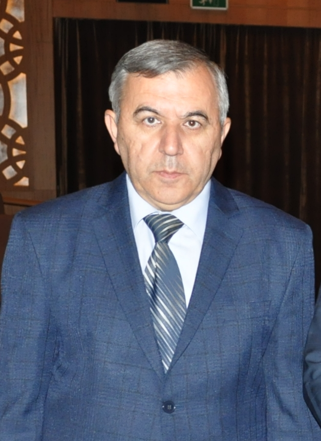 Nadir Bədəlov ssenari müəllifi olduğu "Fitnə" filminin Nizami Kino Mərkəzində təqdimatı zamanı